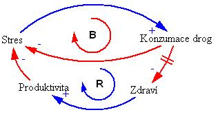 Dlouké a krátké časové období